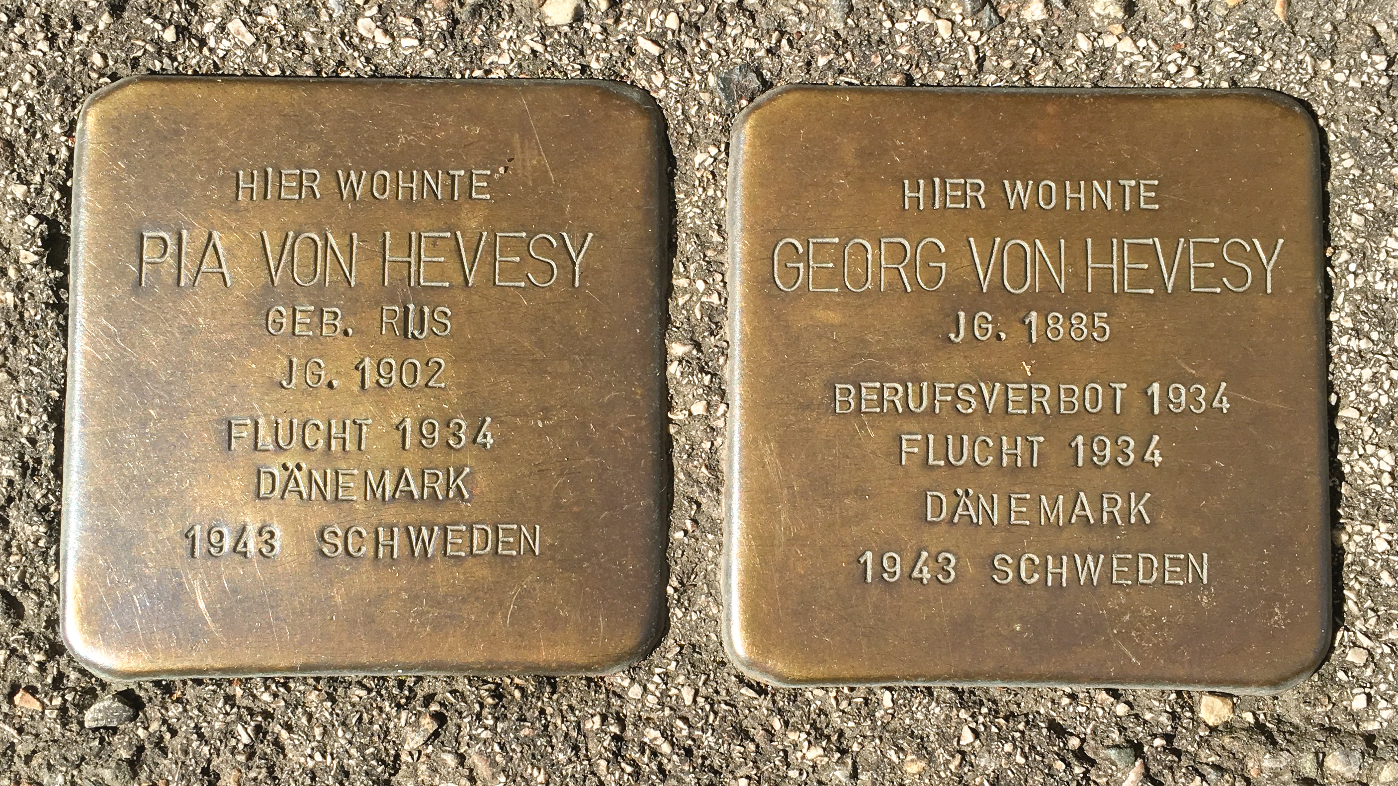 Stolpersteine von Georg und Pia von Hevesy in der Rosastraße 21 in Freiburg im Breisgau